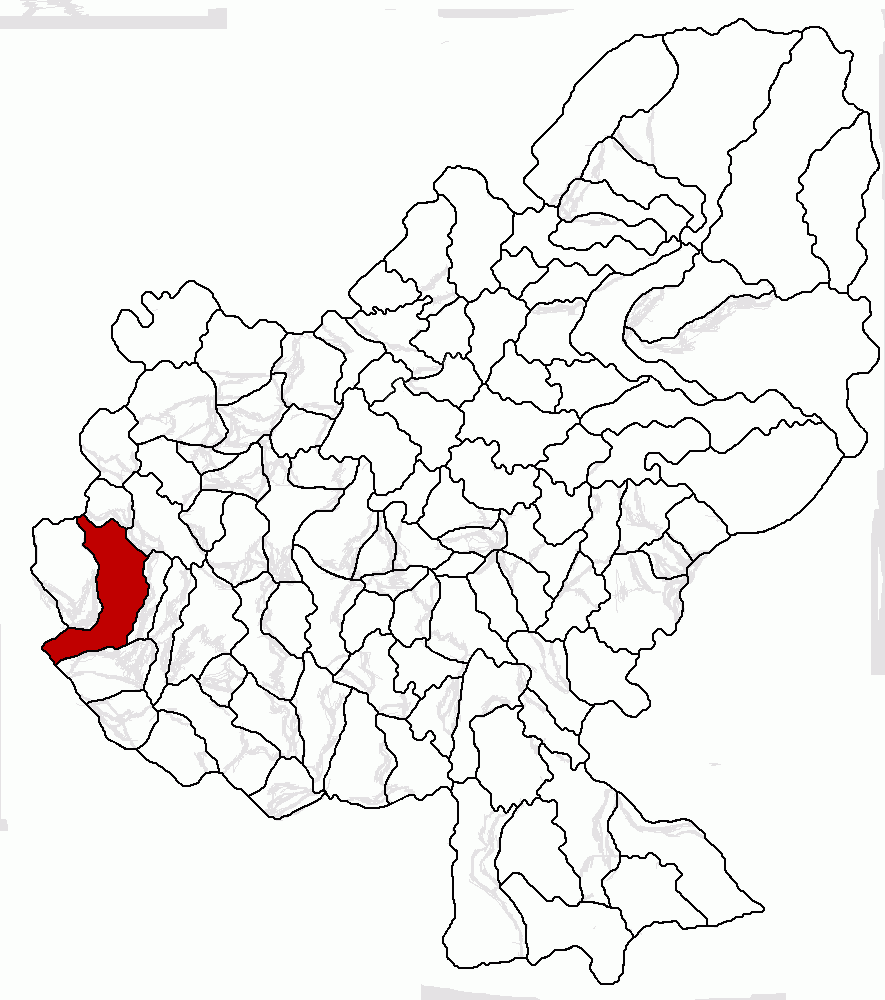 Categorie:Hărţi ale judeţului Mureş